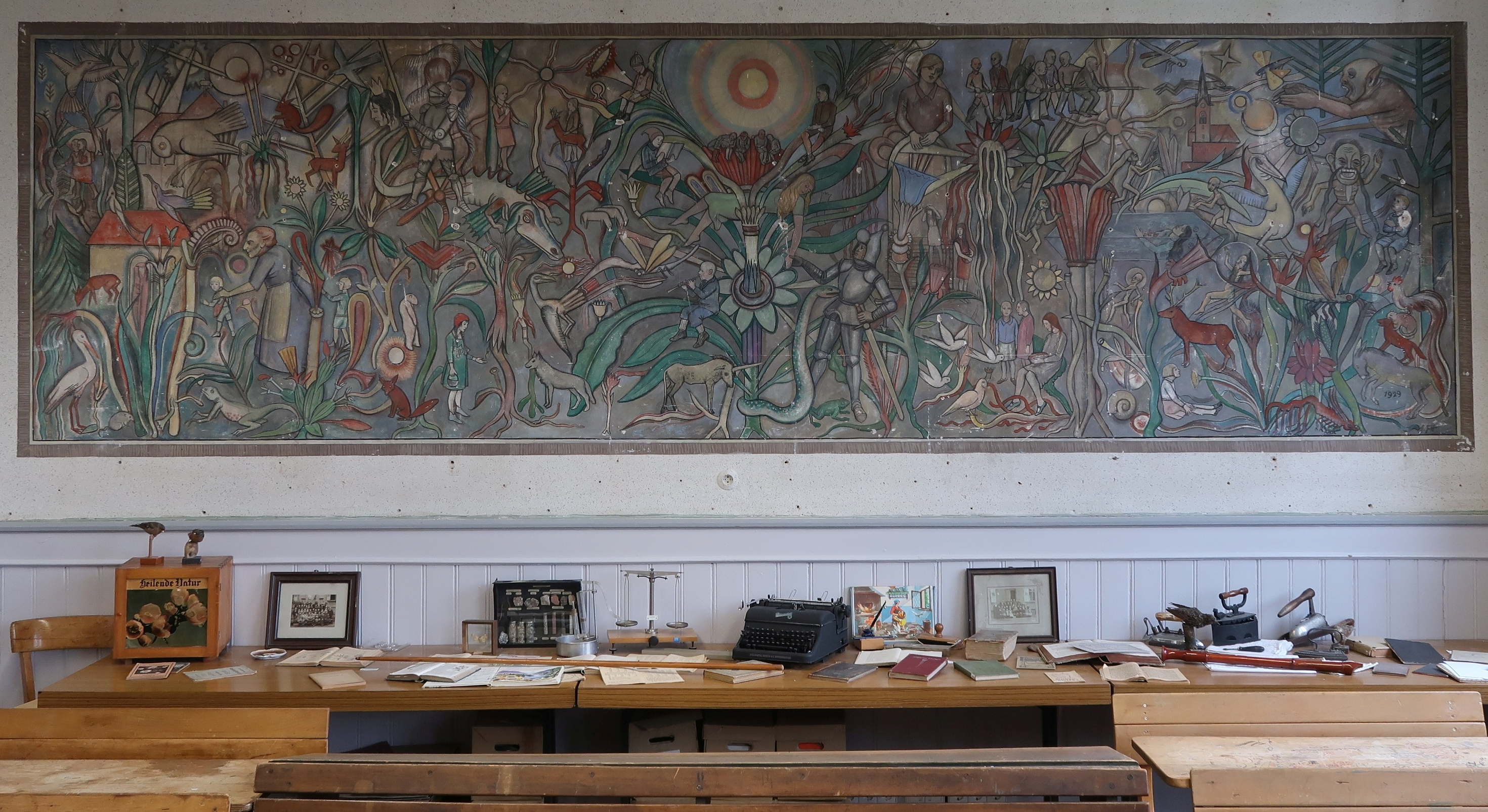 Wandgemälde in der Waldenserschule im Badischen Schulmuseum Karlsruhe. Das aus dem Jahre 1929 stammende Gemälde „Palmbacher Märchenwelt“ des bekannten deutschen Malers und Grafikers Hans Fischer-Schuppach zeigt zahlreiche Details aus Märchen der Brüder Grimm auf. 40 Märchen konnten bisher auf dem Bild bestimmt werden. Diese werden ergänzt durch verschiedene Tiere und Insekten, erfundene Pflanzenformen, markante Palmbacher Gebäude wie Kirche und Rathaus, sowie durch zahlreiche kleine und große menschliche Figuren. Bei allen menschlichen Figuren im Bild wurden damals Palmbacher Schüler von Klasse 3 bis Klasse 8 verewigt.